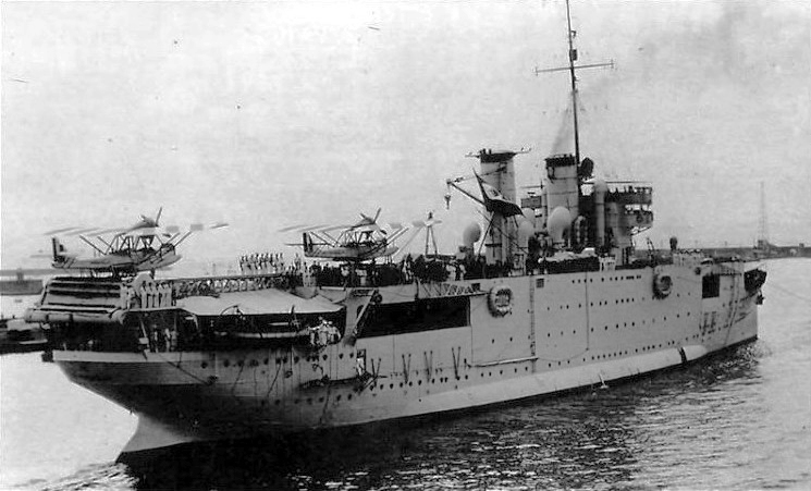 Nape appoggio idrovolanti Giuseppe Miraglia